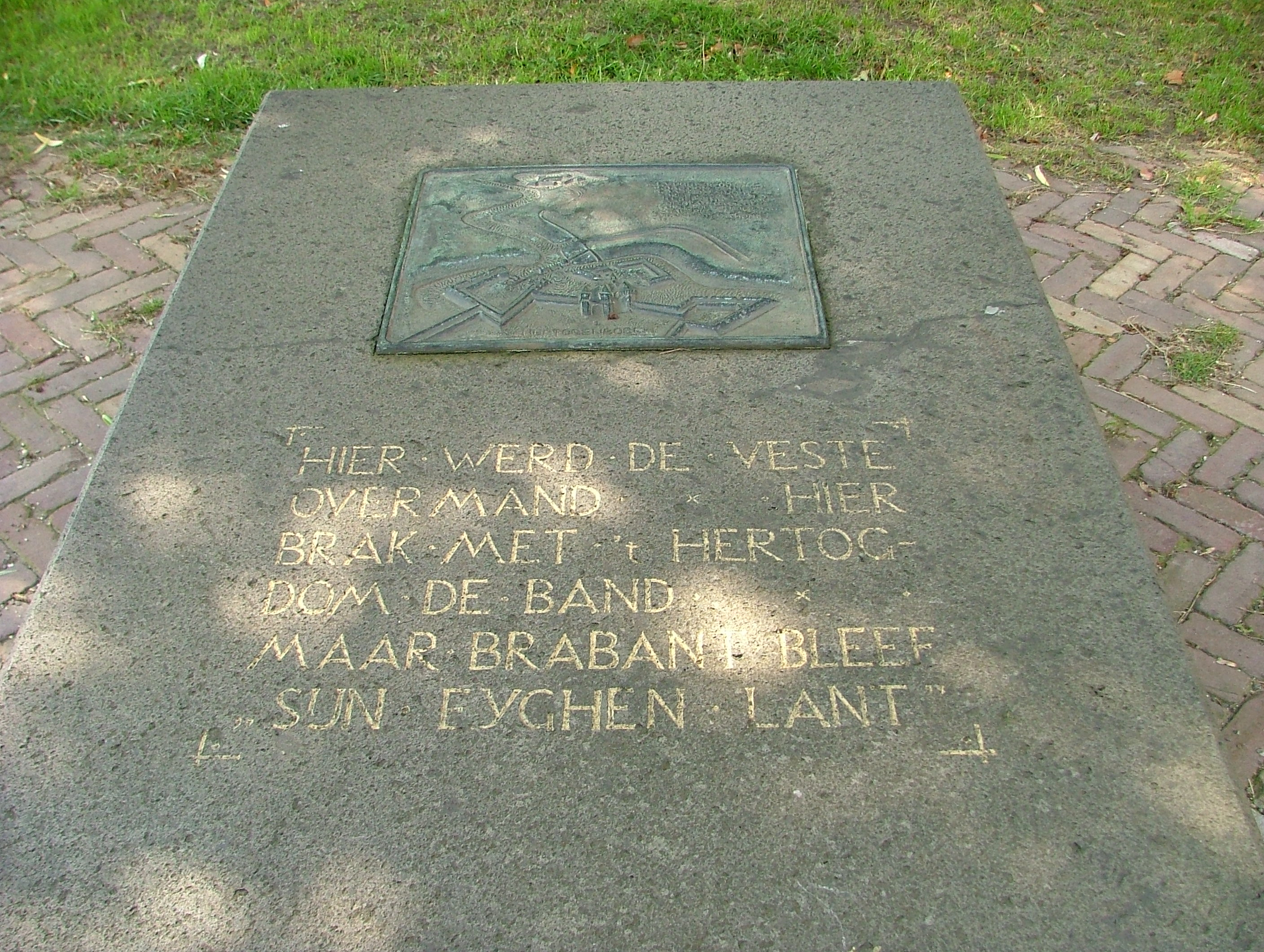 Plakaat op Bastion Vught. En daarom zijn we nou bij Nederland en niet bij België.